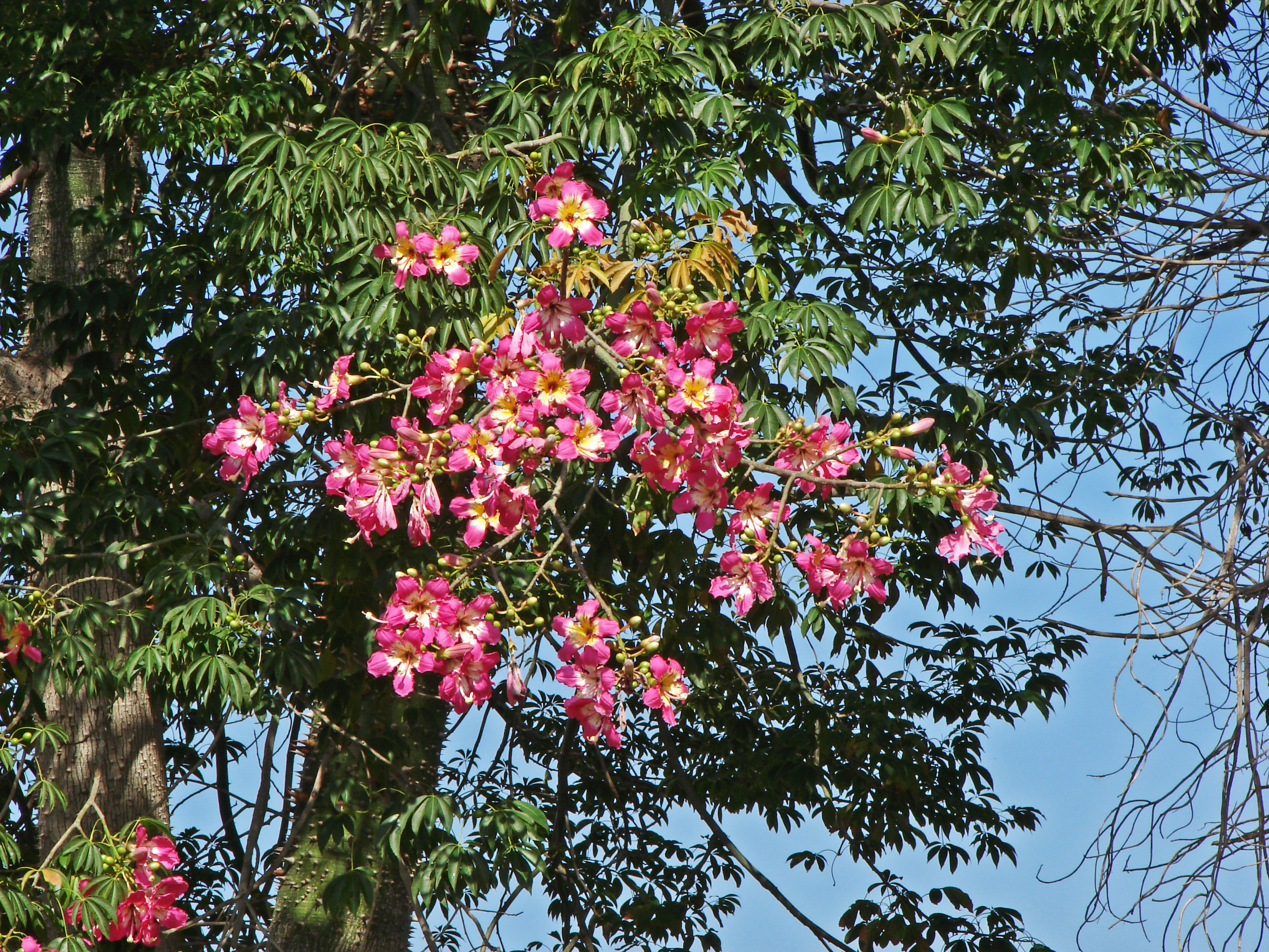 Zweig mit Blüten - Puerto de la Cruz, Teneriffa, Spanien